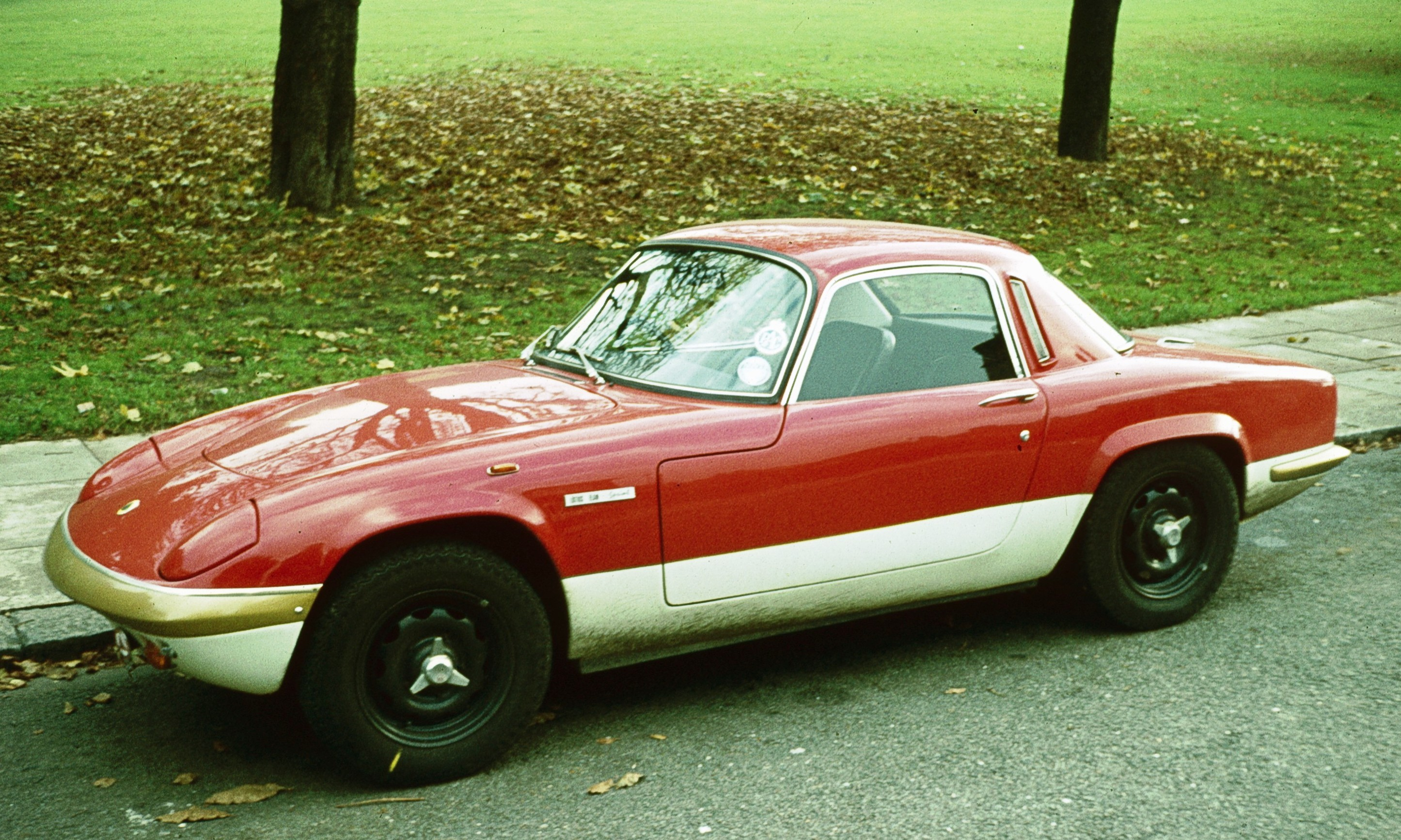 Lotus Elan S4 Sprint Coupé model 36